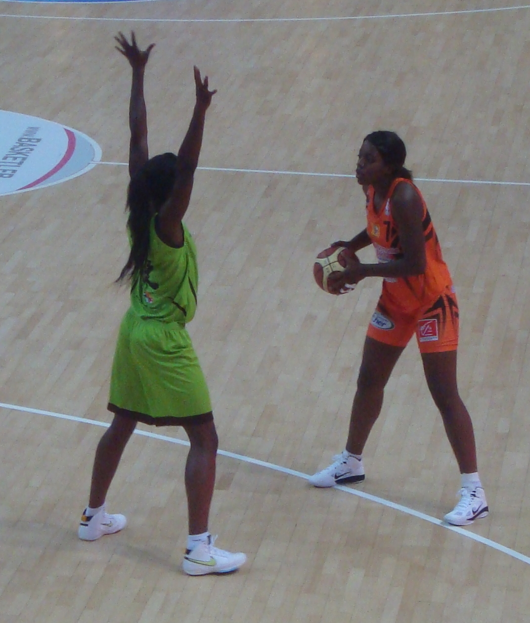 Les basketteuses française Endy Miyem (balle en main) et Laëtitia Kamba (en défense)